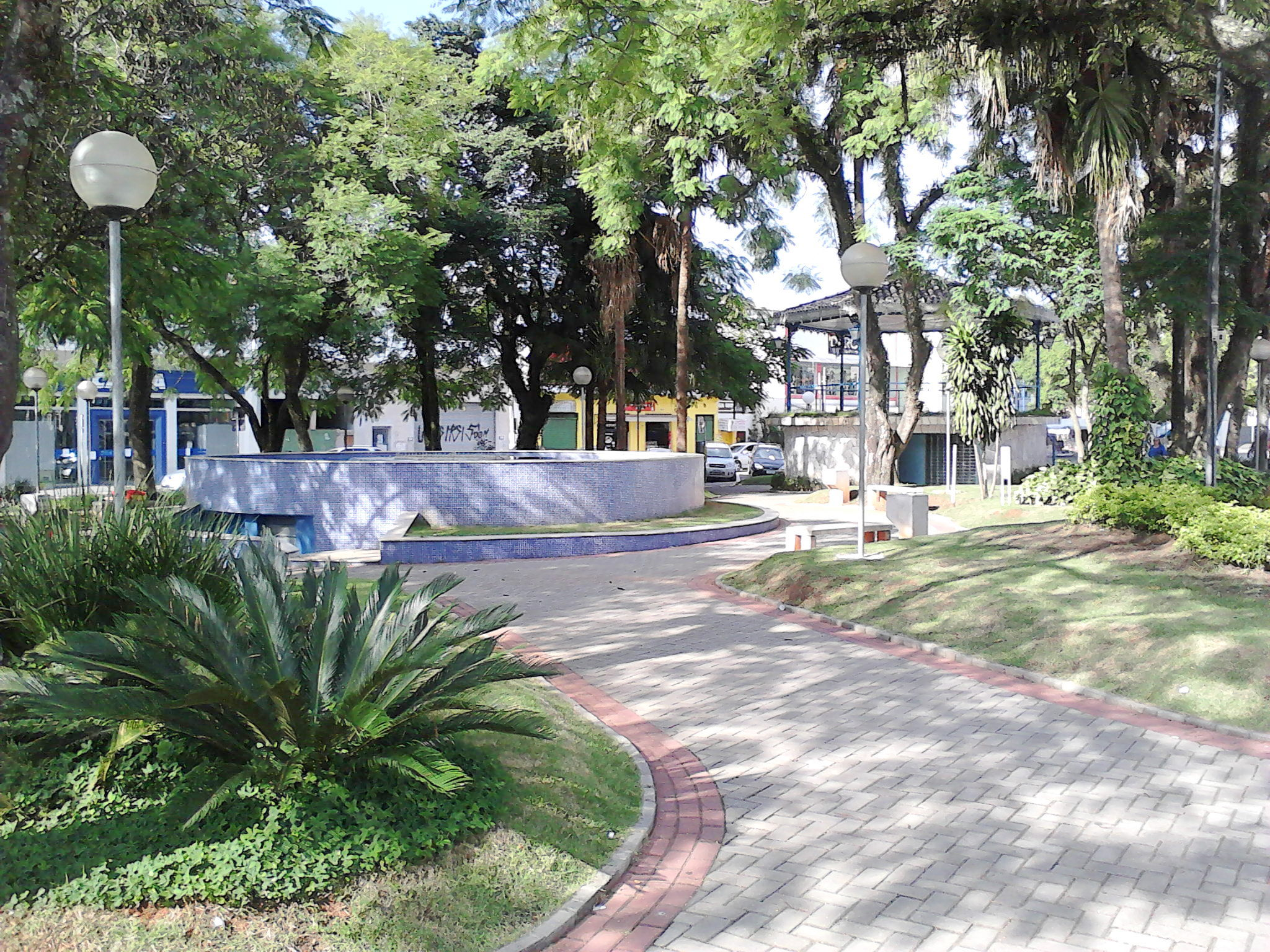 Praca Benedito Ferreira Barbosa (Praça do Coreto), no centro de Arujá, SP, Brasil.